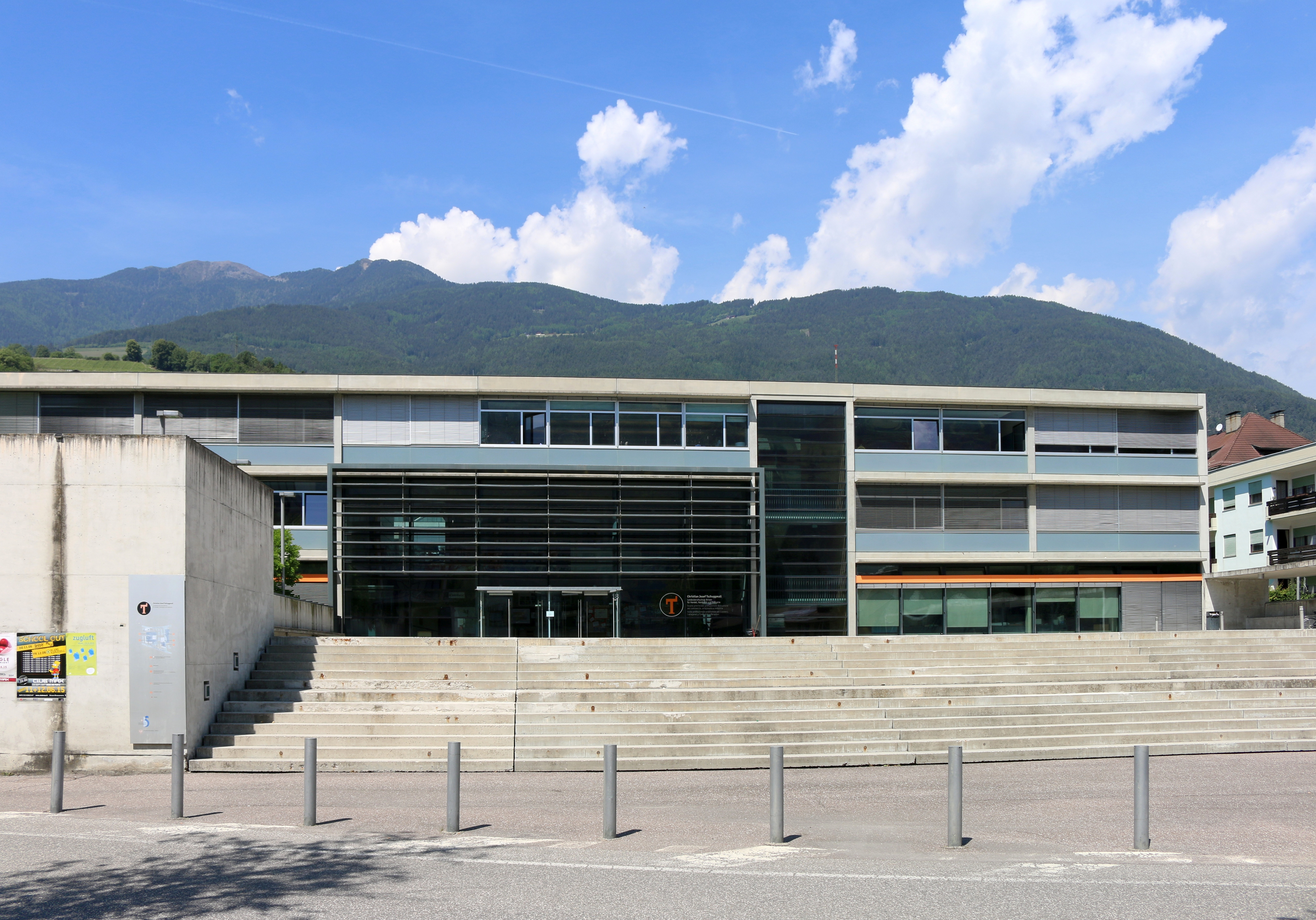 Brixen, Südtirol: Gebäude Tschuggmall Schule